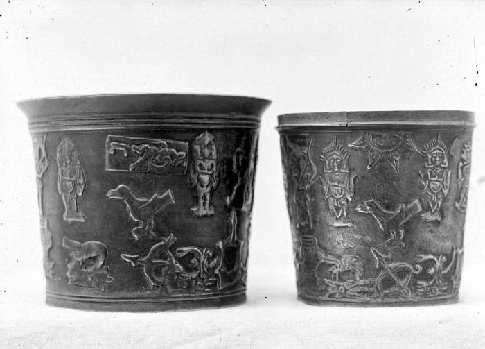 Negatief. Bronzen zodiakbekers